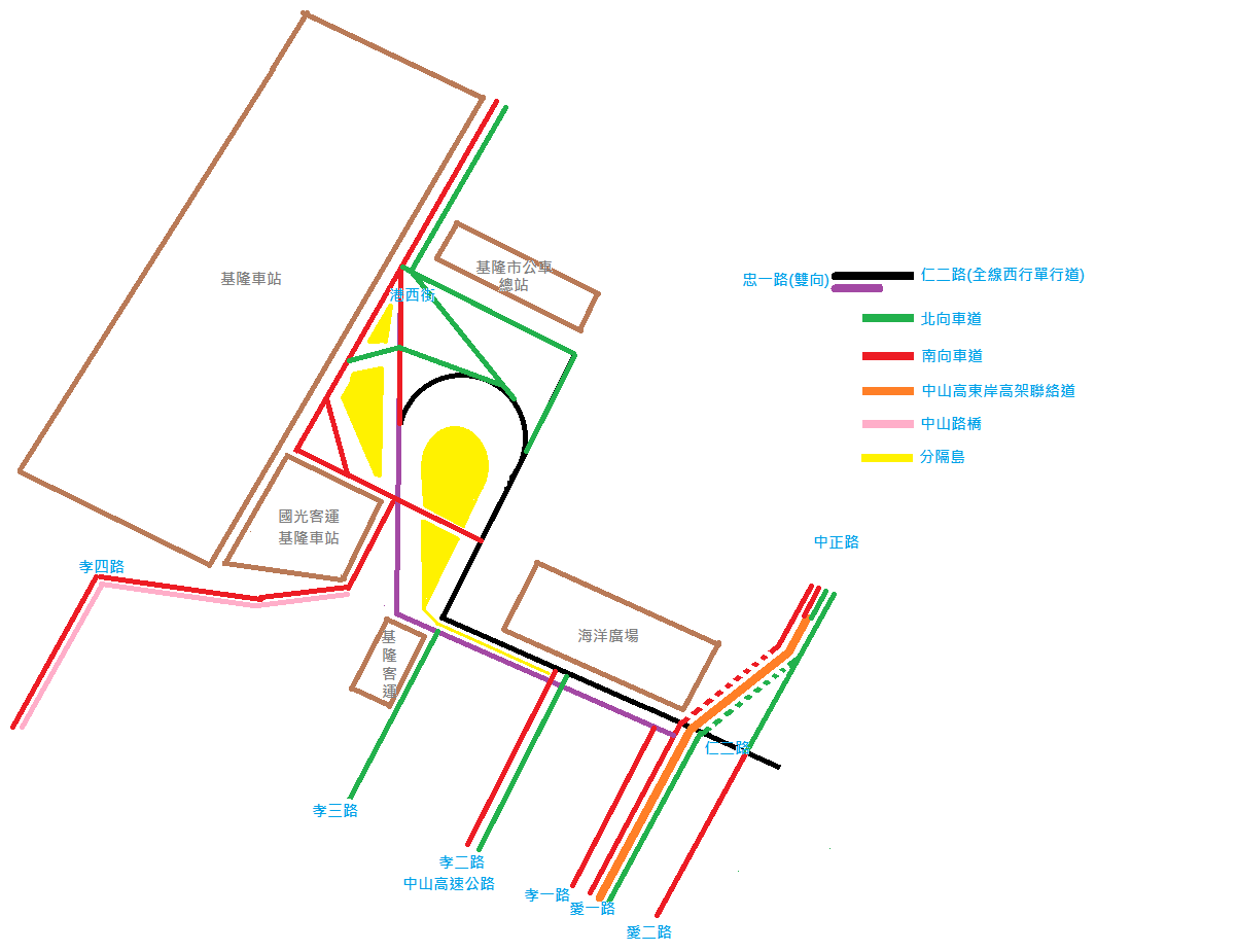 中文（台灣）: 基隆市仁愛區忠一路示意圖